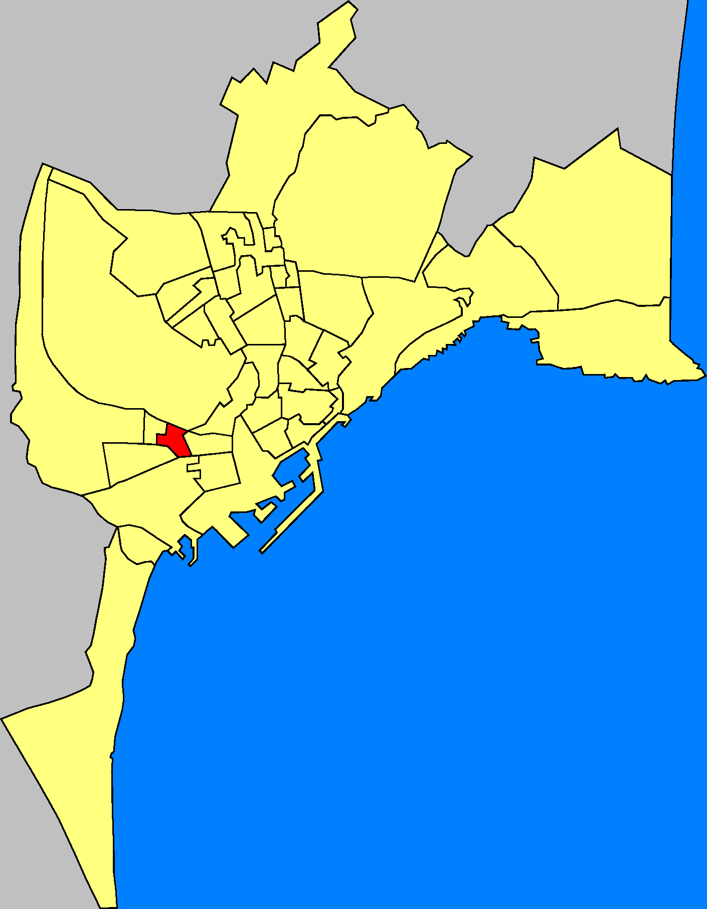 San Fernando-Princesa Mercedes de Alicante